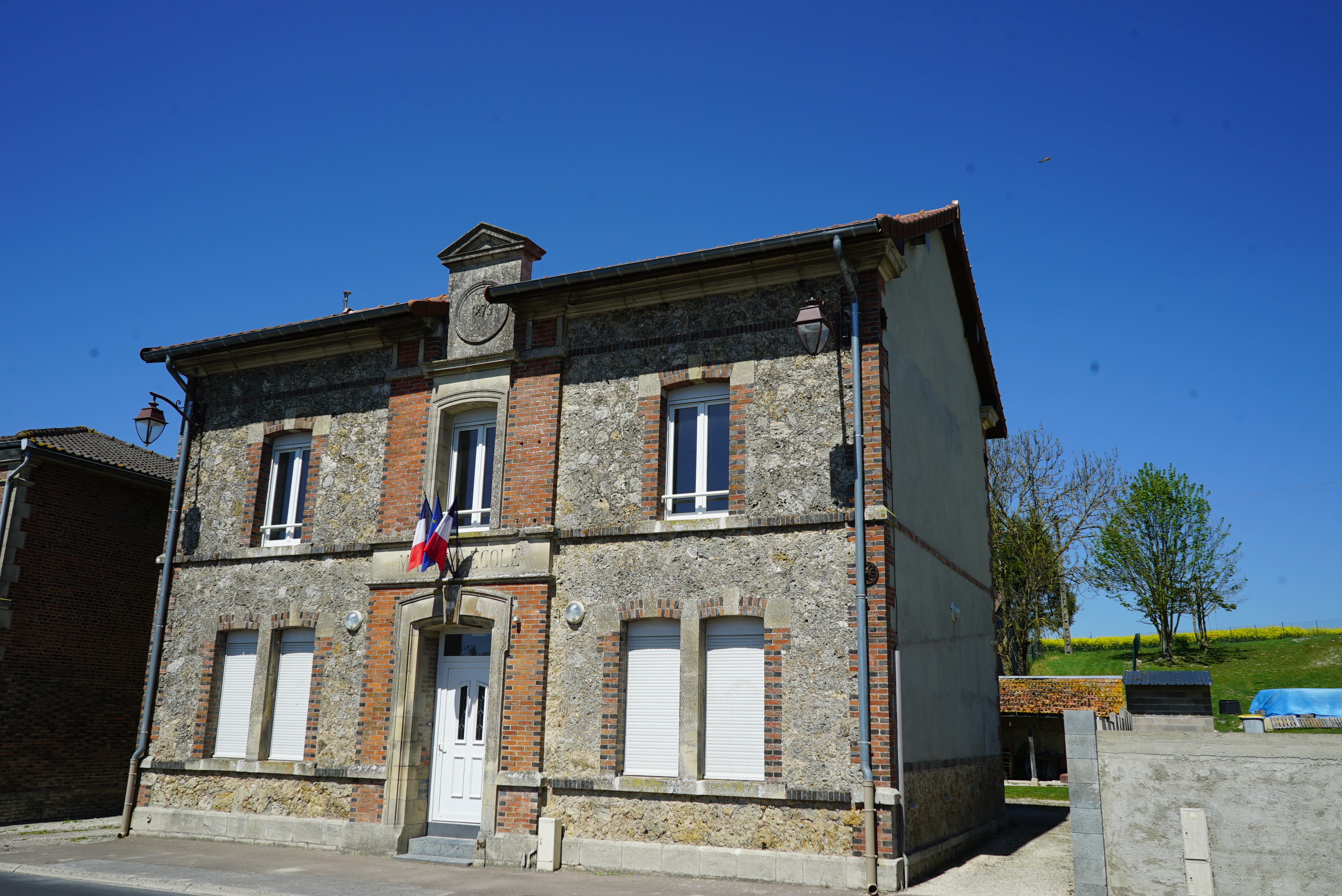 vue du village.